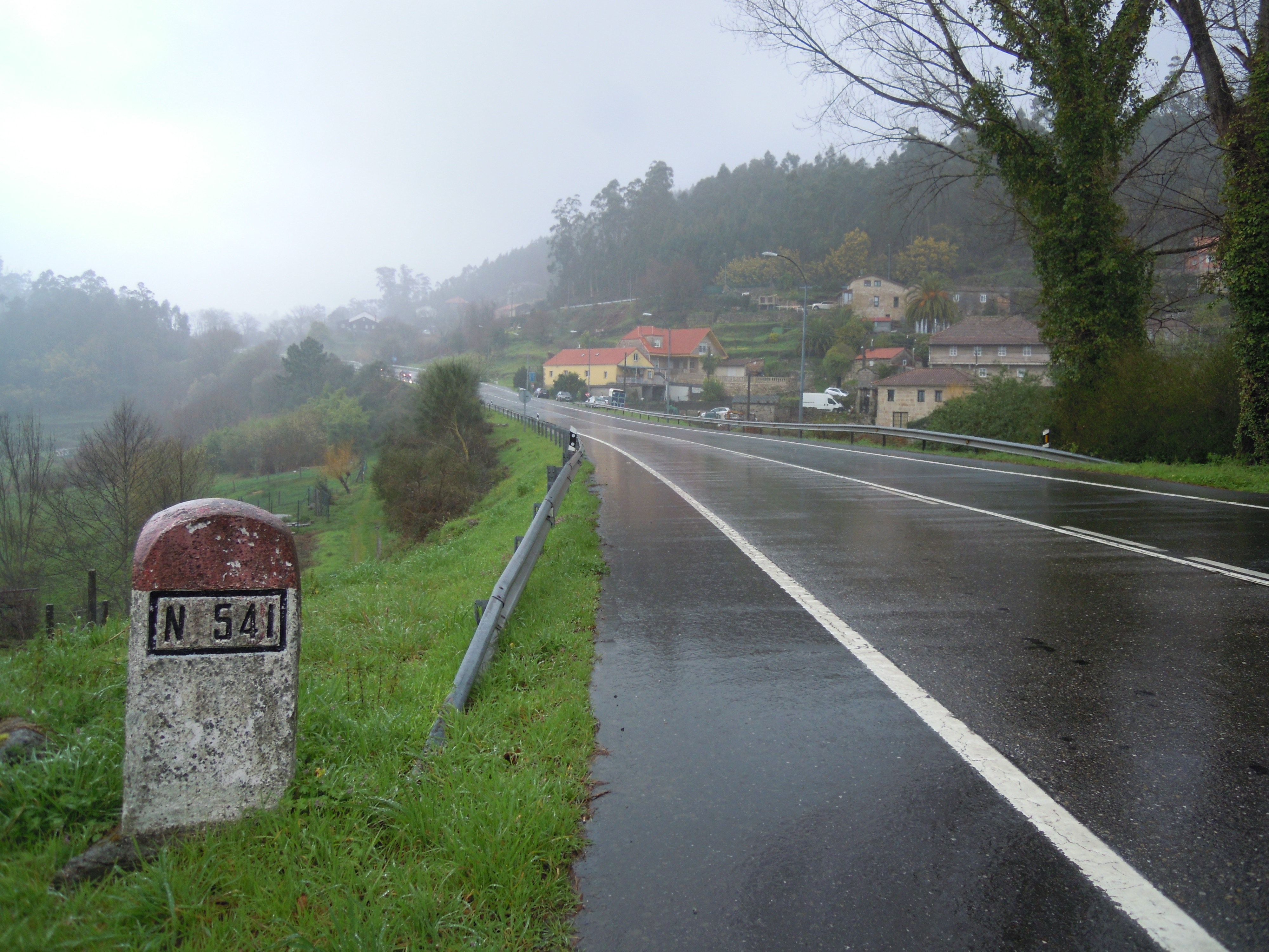 Fito quilométrico nº 85 na estrada N-541 ao seu paso por Tenorio (Cerdedo-Cotobade). Á dereita a aldea de Covas